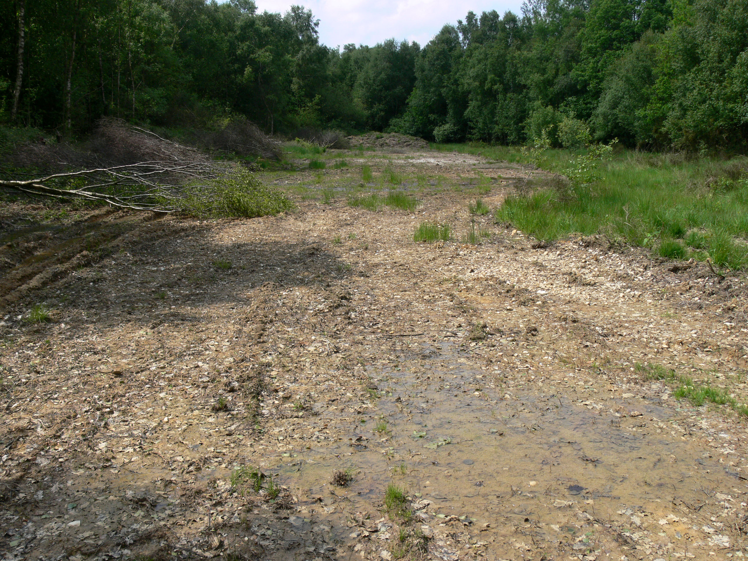 Chantier de scrappage. Après la coupe des arbres, le sol superficiel a été "scrappé" et exporté, de manière à ce que les espèces des milieux oligotrophes et ensoleillés (ex : bruyère, carex, sphaignes, droseras.. ) puissent spontanément réapparaître à partir des graines encore présentes dans le sol ou de semences apportées par le vent ou l'eau (zone-humide périodiquement semi-inondé). Travail fait sous l'égide du conservatoire botanique national de Bailleul et d'EDEN 62